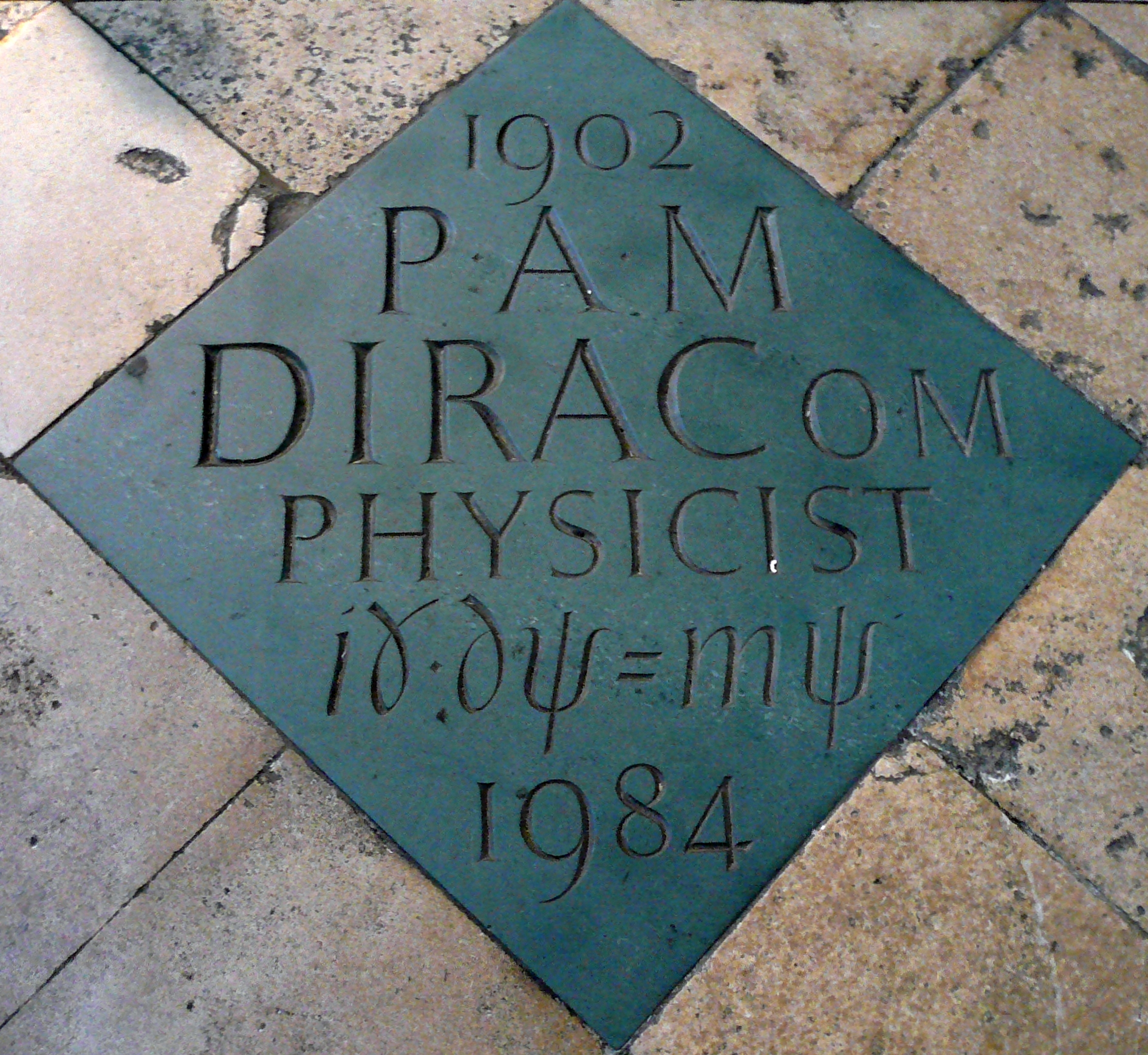 The commemorative marker in Westminster Abbey, London, UK